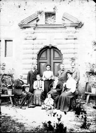 Fonds Trutat - Photographie ancienne - Portail du château de Pechrodil déplacé au château de Cornusson Cote : TRU B 911 Localisation : Bibliothèque municipale de Toulouse, Original non communicable Titre : Groupe de famille, Cornusson, 1905 Auteur : Trutat, Eugène Rôle de l’auteur : Photographe Lieu de création : Cornusson (Parisot ; château) Date de création : 1859-1910 [entre] Mesures : : 18 x 13 cm Mot(s)-clé(s) : -- -- Homme -- Costume masculin -- Femme -- Costume féminin -- Enfant -- Costume d'enfant -- Château -- Porte -- Fronton -- Colonne -- Entablement -- Cour -- Entrée -- Banc -- Cornusson (Parisot ; château) -- Parisot (Tarn-et-Garonne) -- Saint-Antonin-Noble-Val (Tarn-et-Garonne ; canton) -- Midi-Pyrénées (France) -- Pechrodil -- Perrodil -- 19e siècle, 2e moitié -- 20e siècle, 1e quart Médium : Photographies -- Négatifs sur plaque de verre -- Noir et blanc -- Portraits -- Groupe [1] Bibliothèque de Toulouse. Domaine public